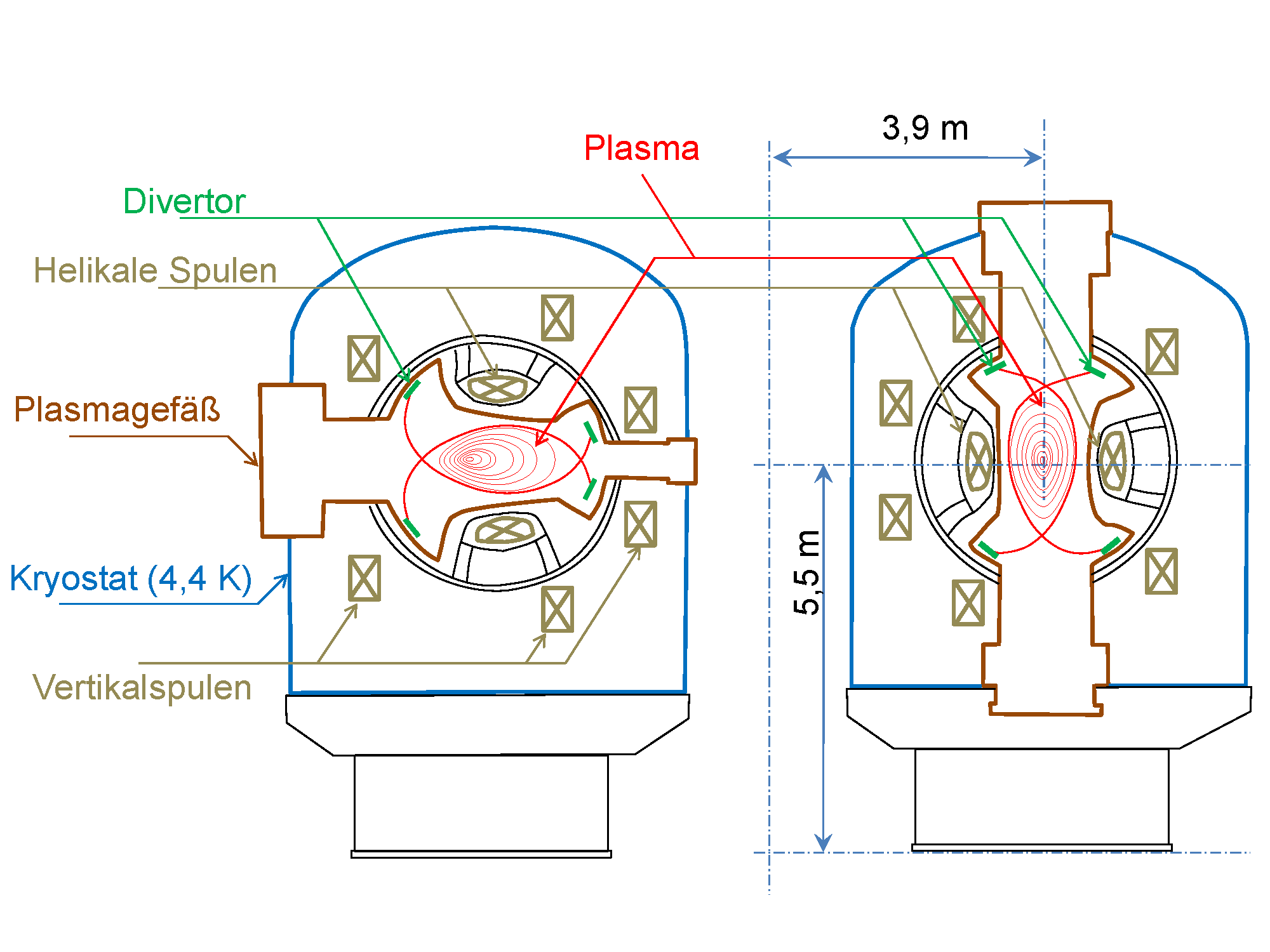 Querschnittszeichnung des Large Helical Device (LHD)